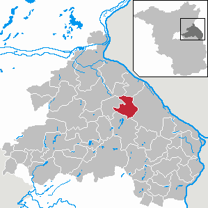 Neutrebbin in Brandenburg (Country) - District Märkisch-Oderland